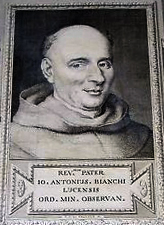 Stampa da incisione